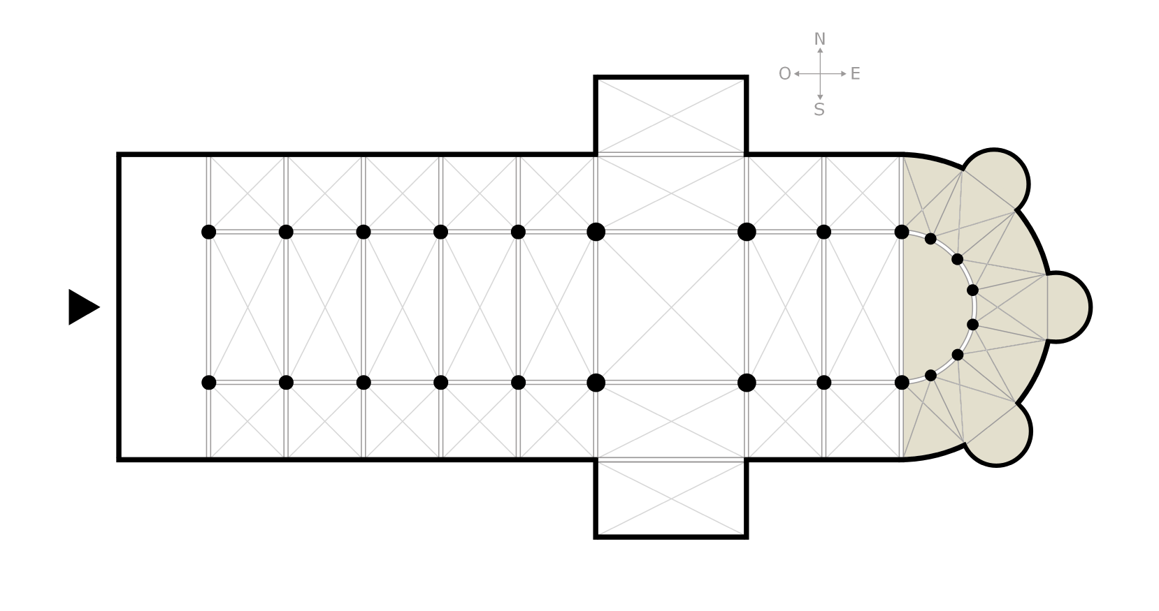 basisfile is afkomstig van wikipedia commons, zelf kleur toegevoegd thumb|left|Origineel op Commons